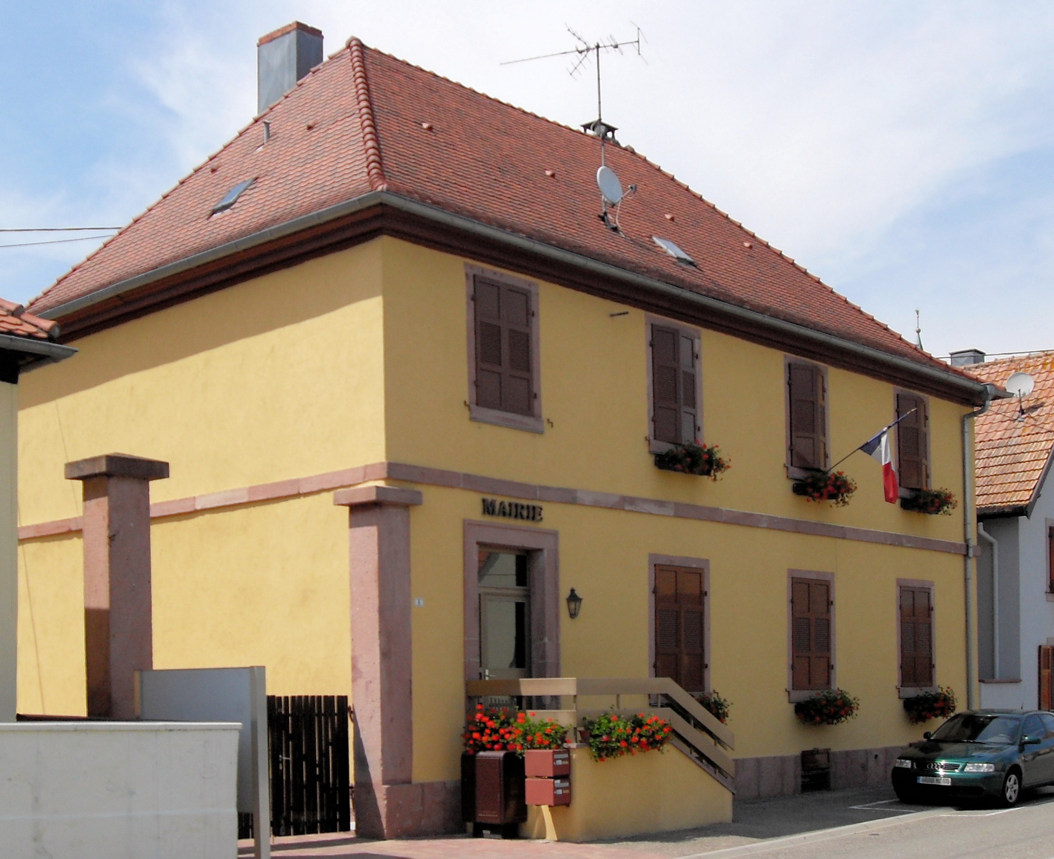 La mairie de Durrenentzen